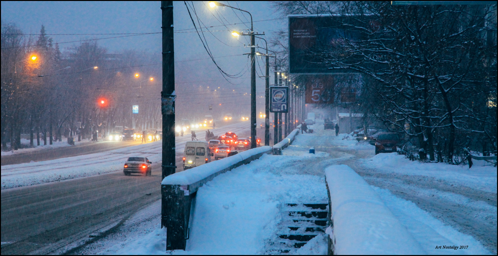 зимній проспект